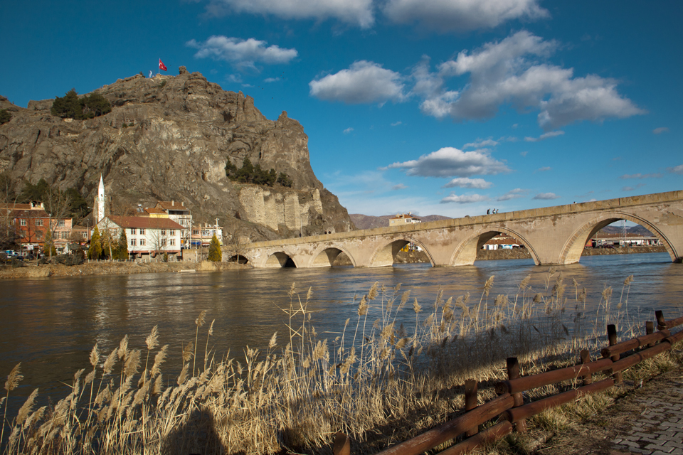 Osmancık Kalesi ve Koyunbaba Köprüsü